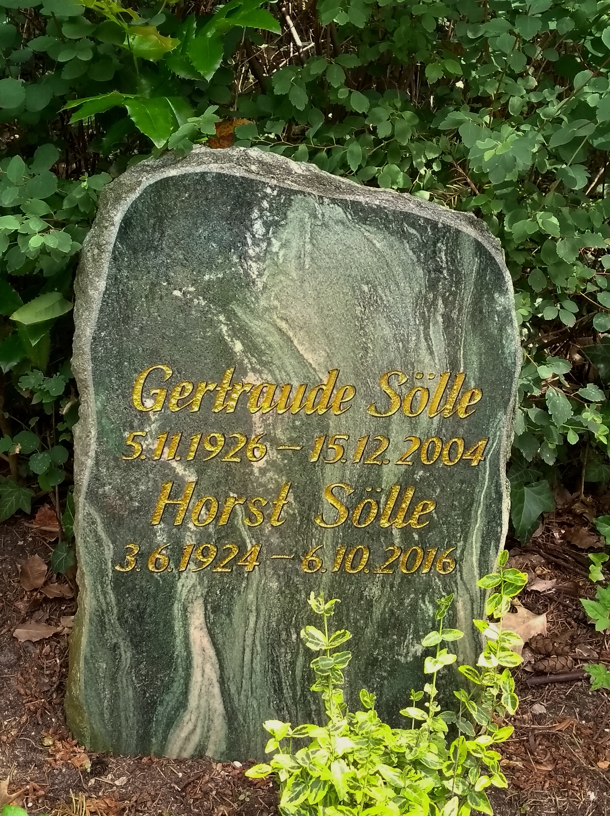 Grab Horst Sölle